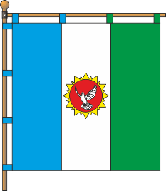 Прапор села Табаки, Болградський район, Одеська область